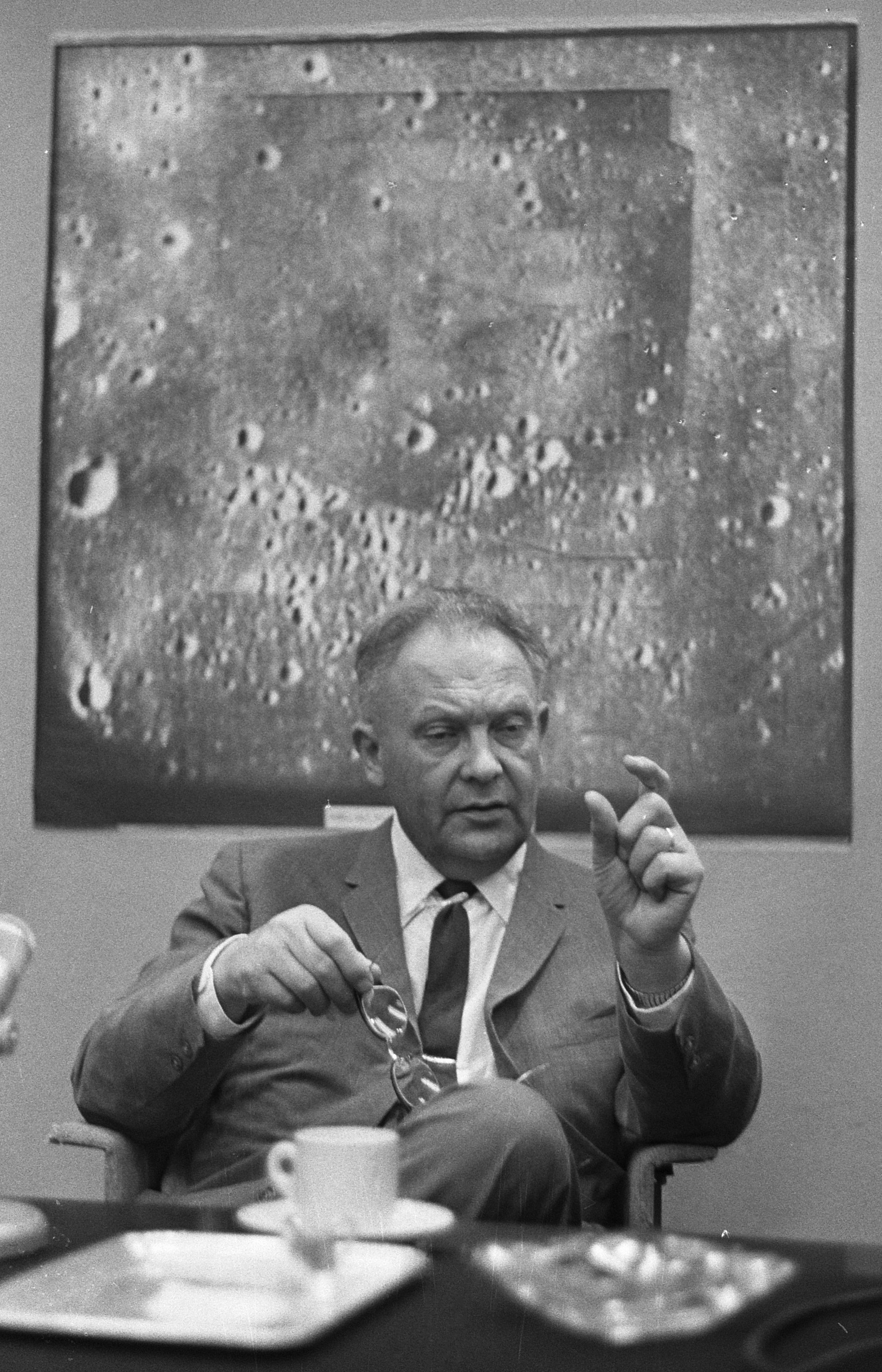 Aankomst prof. Kuiper op Schiphol, prof. Kuiper bij de maanfotos